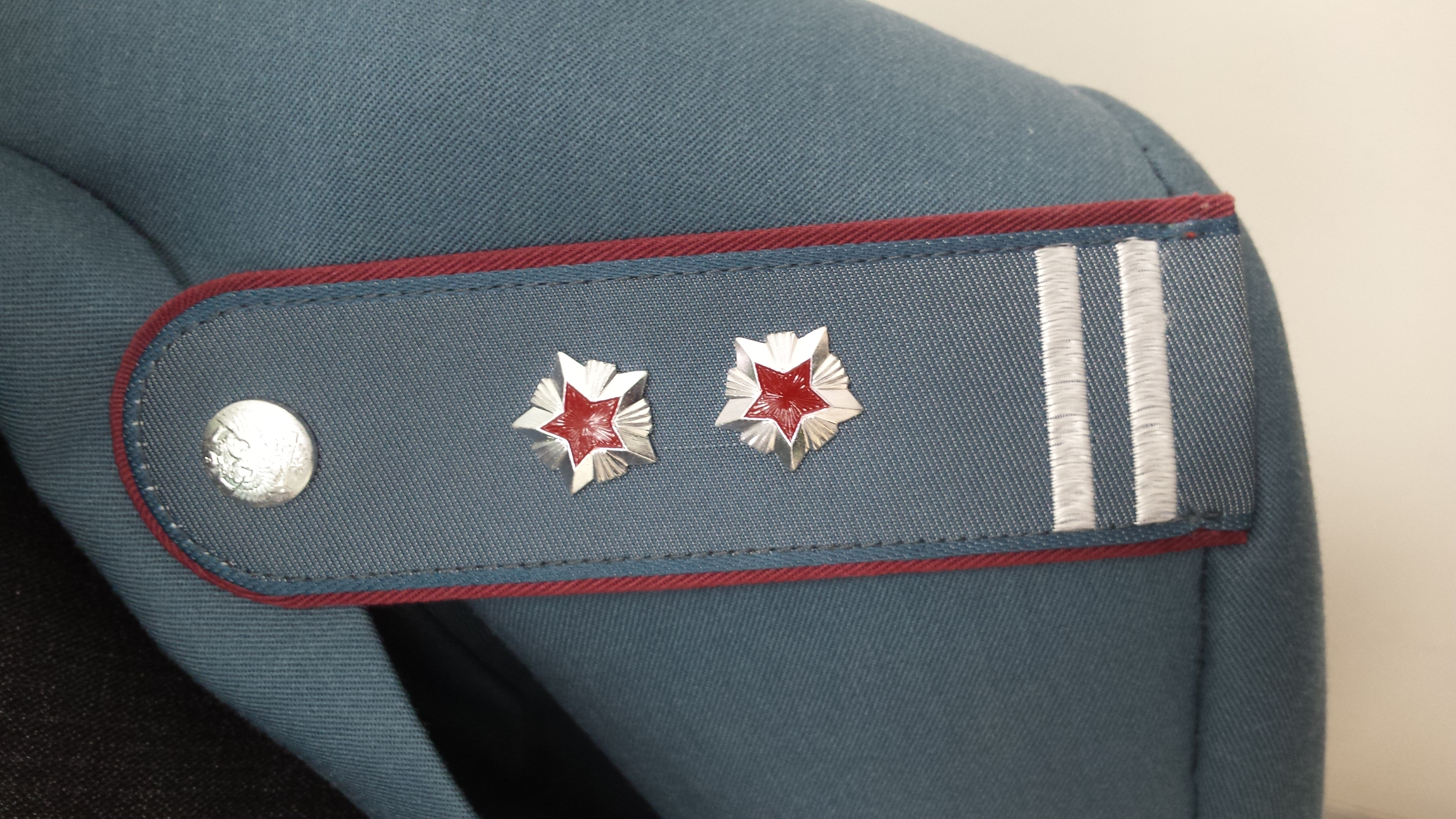 Погон референта государственной гражданской службы РФ 2 класса